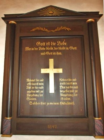 Altes Retabel (Altaraufsatz) der Westrumer St.-Elisabeth-Kirche